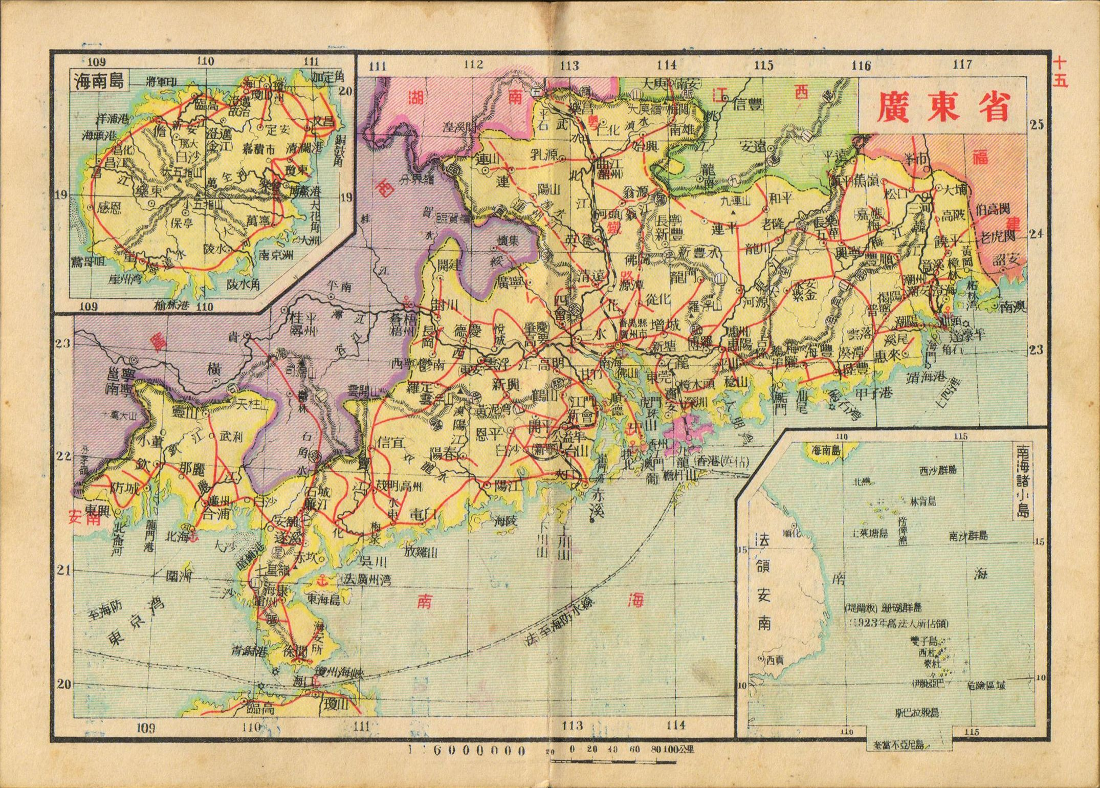 亚新地学社1936年《袖珍中华全图》广东省